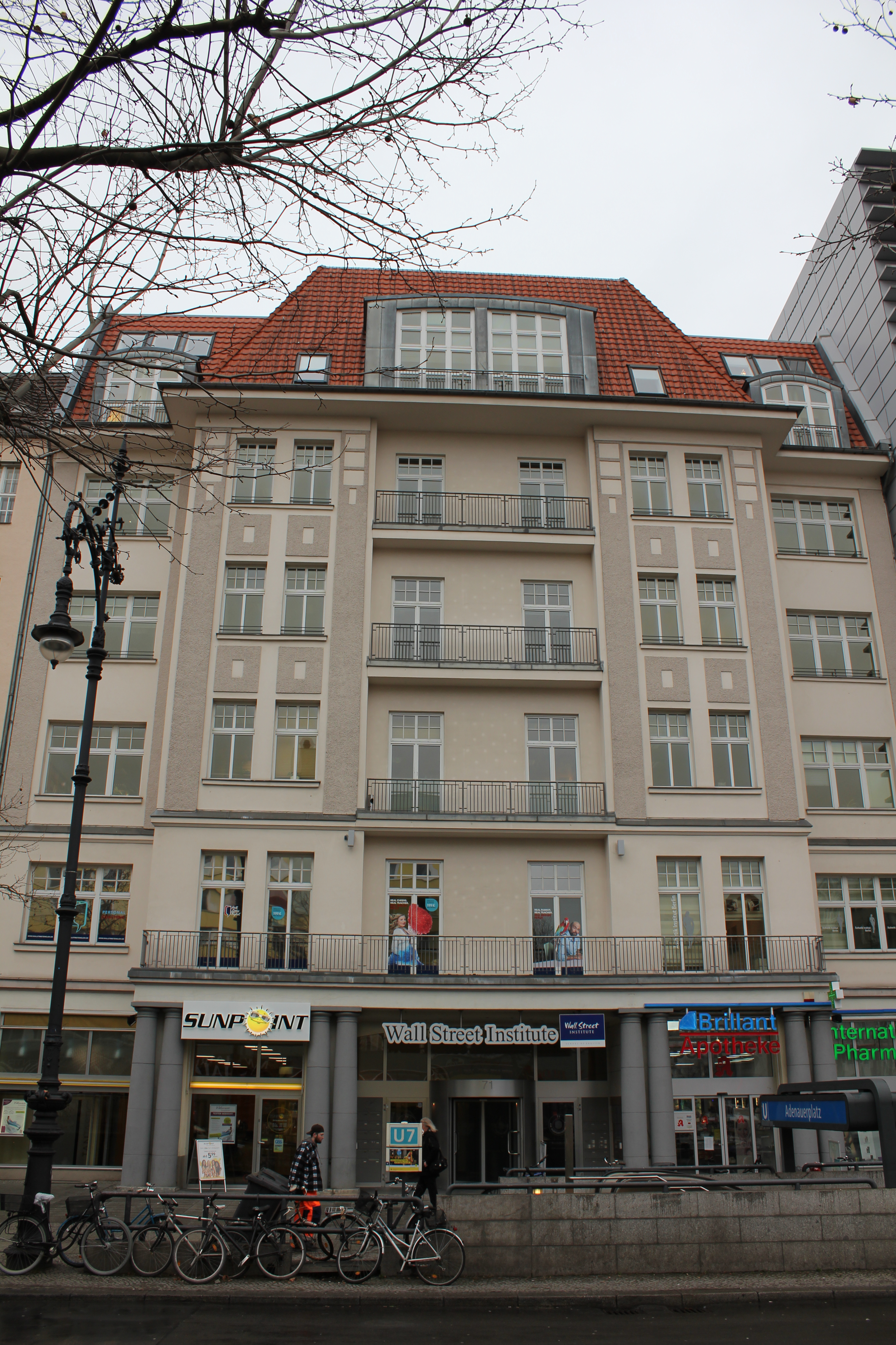 Residència d'Eugeni Xammar i Puigventós. Corresponsal a Berlín.